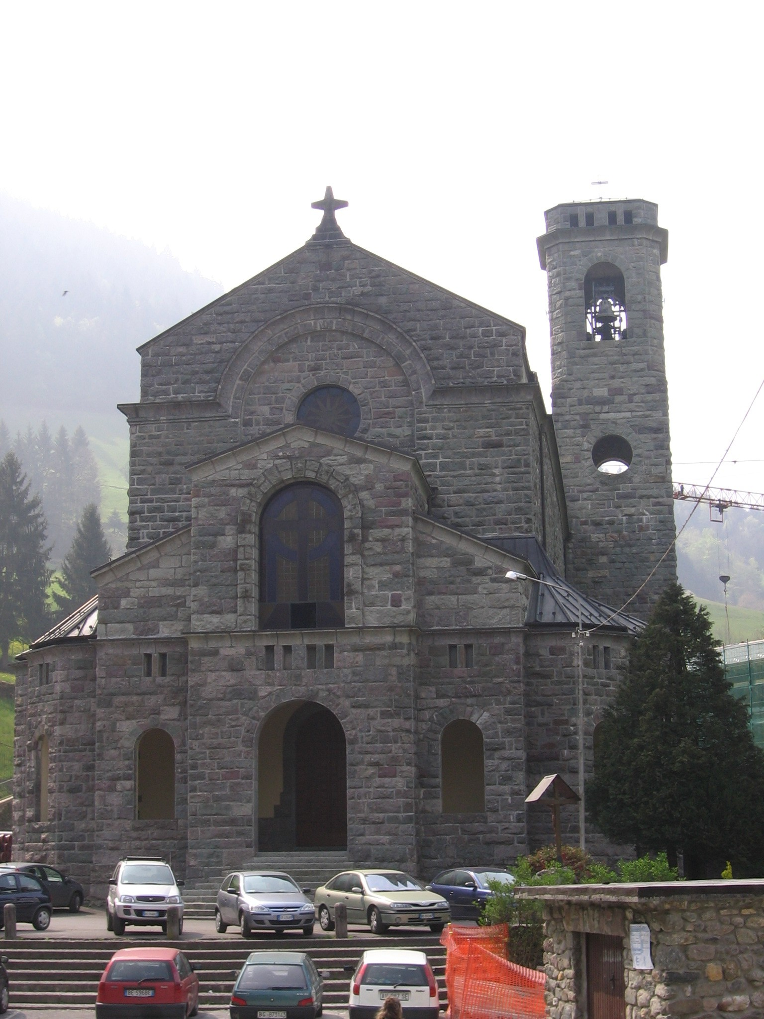 Parrocchia S. Martino, Gandellino, Bergamo, Italia